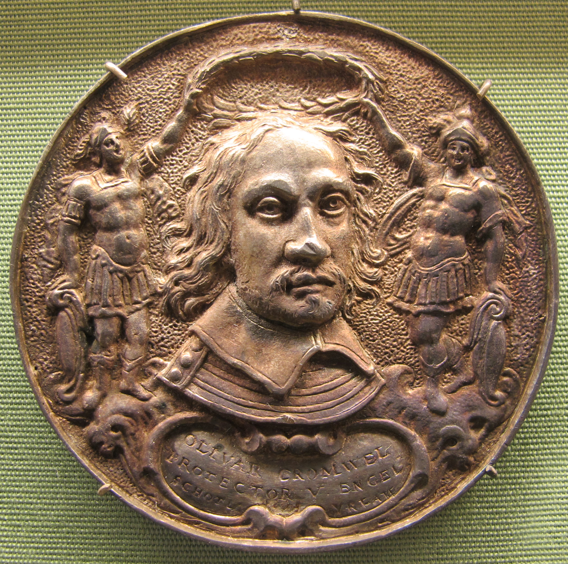 Oliver Cromwell (verso Masaniello), arg, 1658